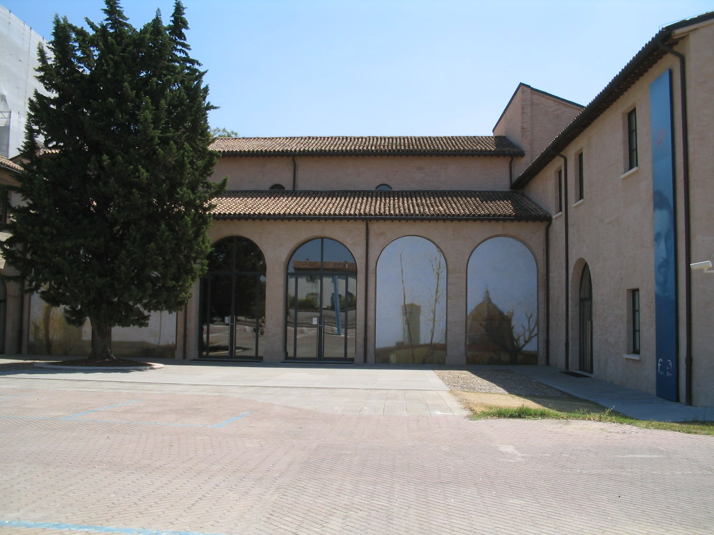 Complesso di San Domenico, Forlì (Italy